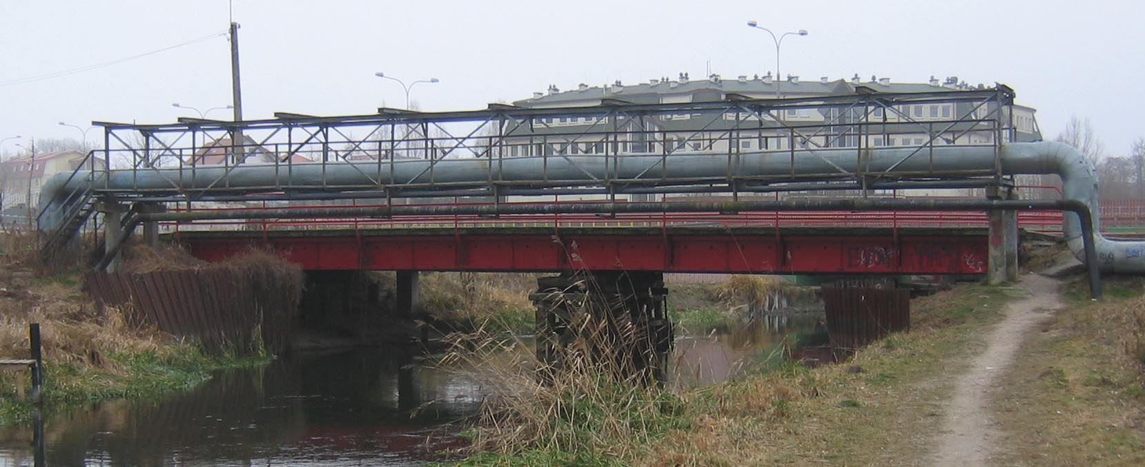 Most wschodni w ciągu ulicy Tuwima (Olsztyn)